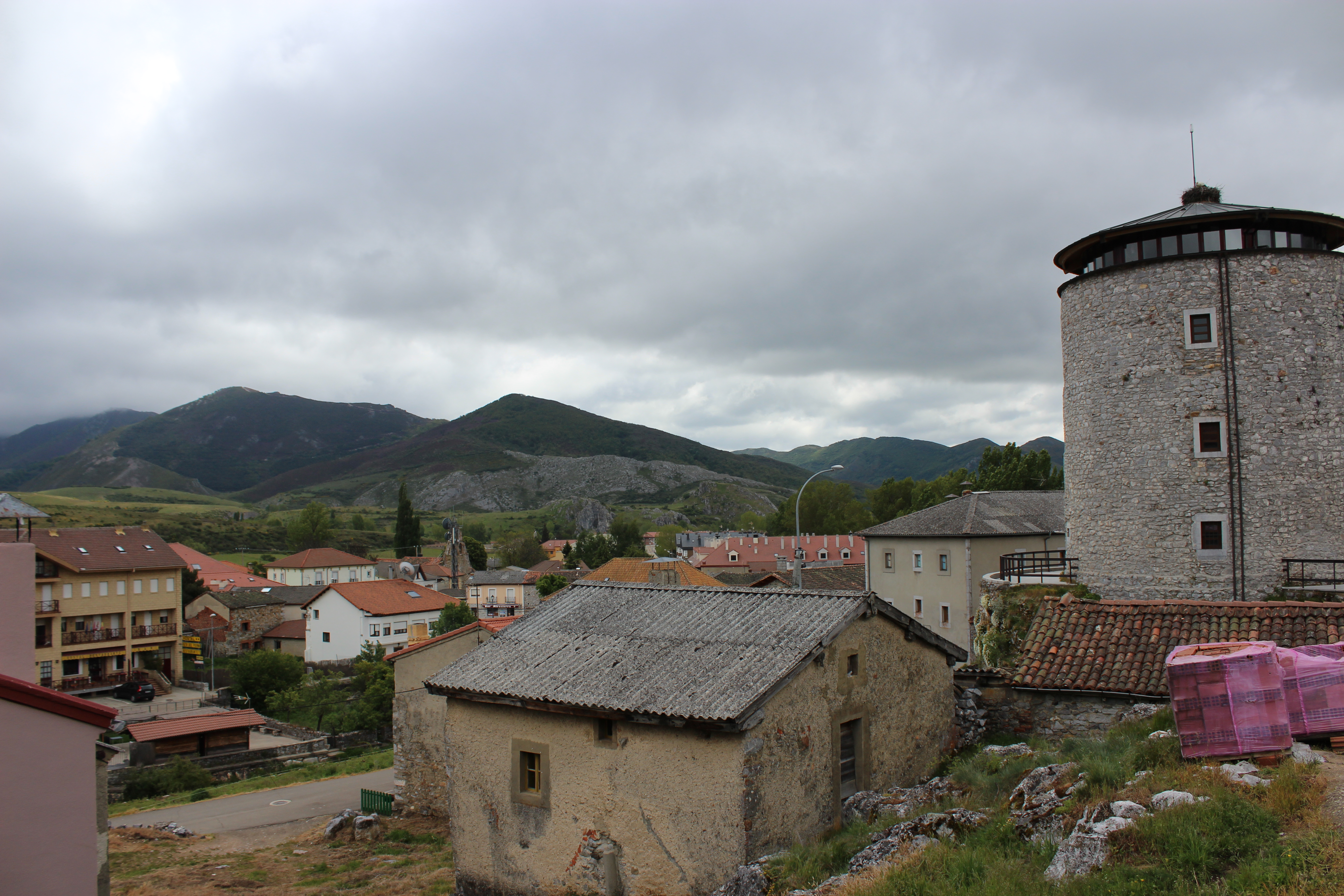 Puebla de Lillo